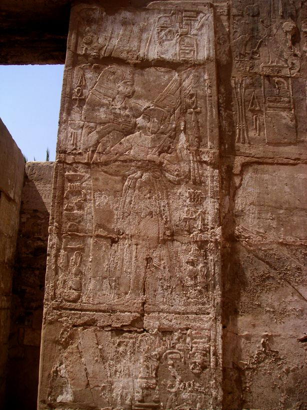 Relief représentant la divine adoratrice Chépénoupet Ire - Temple d'Osiris Heka-Djet à Karnak - XXIIIe dynastie égyptienne